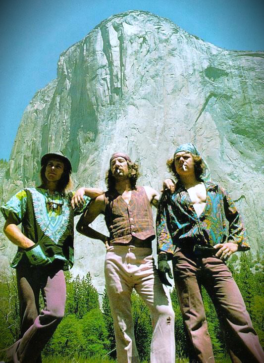 Billy Westbay, Jim Bridwell, et John Long après la première ascension en une journée du Nose en 1975. Reprise pour illustrer le portail Alpinisme et Escalade